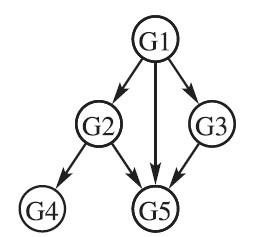 Τα γονίδια αντιστοιχούν σε κόμβους στο δίκτυο και οι ρυθμιστικές σχέσεις μεταξύ των γονιδίων απεικονίζονται με τις κατευθυνόμενες άκρες. Στο παραπάνω απλό παράδειγμα, το γονίδιο G1 ρυθμίζει το G2, το G3, και το G5, το γονίδιο G2 ρυθμίζει το G4 και το G5, και το γονίδιο G3 ρυθμίζει το G5. Η κατανομή των πιθανοτήτων για τα επίπεδα έκφρασης του κάθε γονιδίου διαμορφώνεται από τις παραμέτρους των μπεϋζιανών δικτύων. Η κατανομή πιθανοτήτων για ένα γονίδιο εξαρτάται μόνο από τους αντίστοιχους ρυθμιστές του στο δίκτυο. Για παράδειγμα. Τα επίπεδα έκφρασης της G4 και G5 σχετίζονται μόνο επειδή μοιράζονται ένα κοινό ρυθμιστή G2.